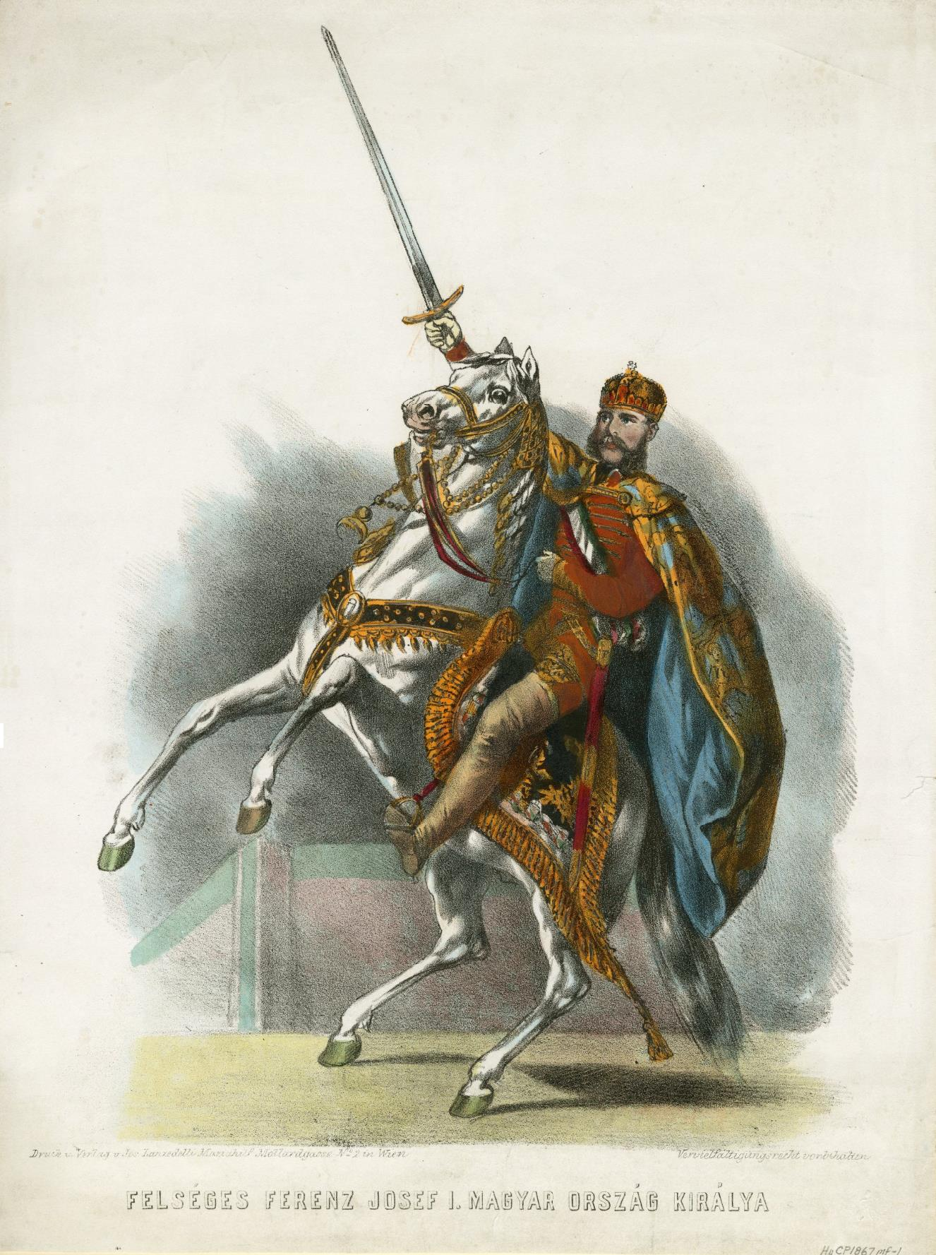 I. Ferenc József osztrák császár, magyar királ, színezett litográfia